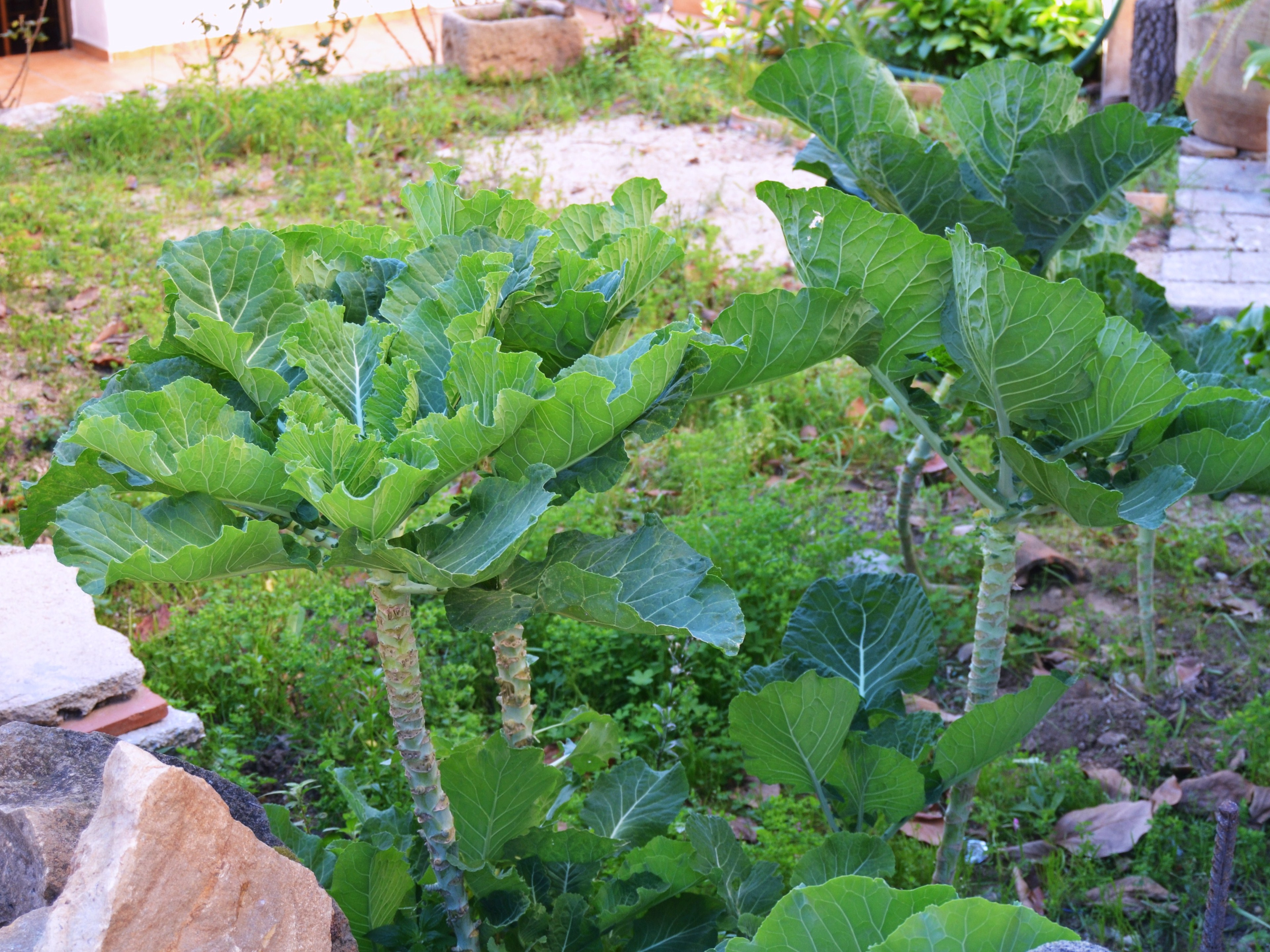 Cols a Jesús Pobre.